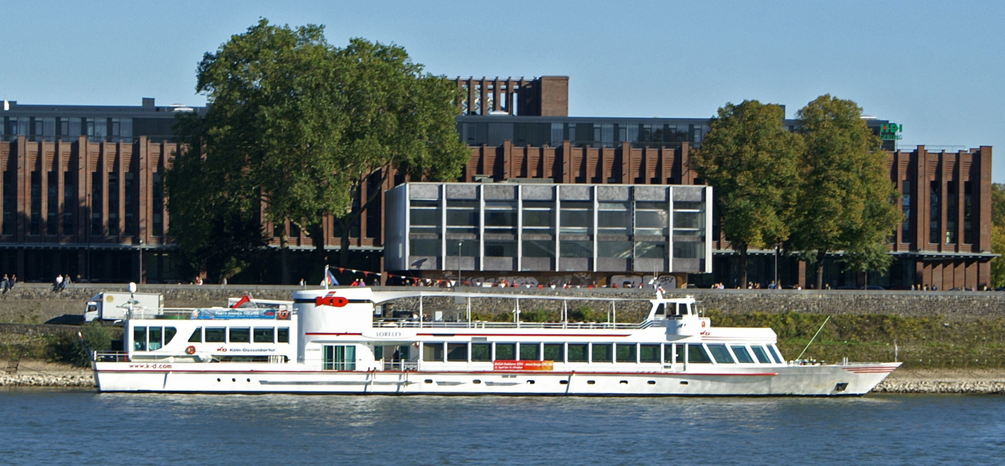 Die MS Loreley der Köln-Düsseldorfer vor den Rheinhallen in Köln-Deutz